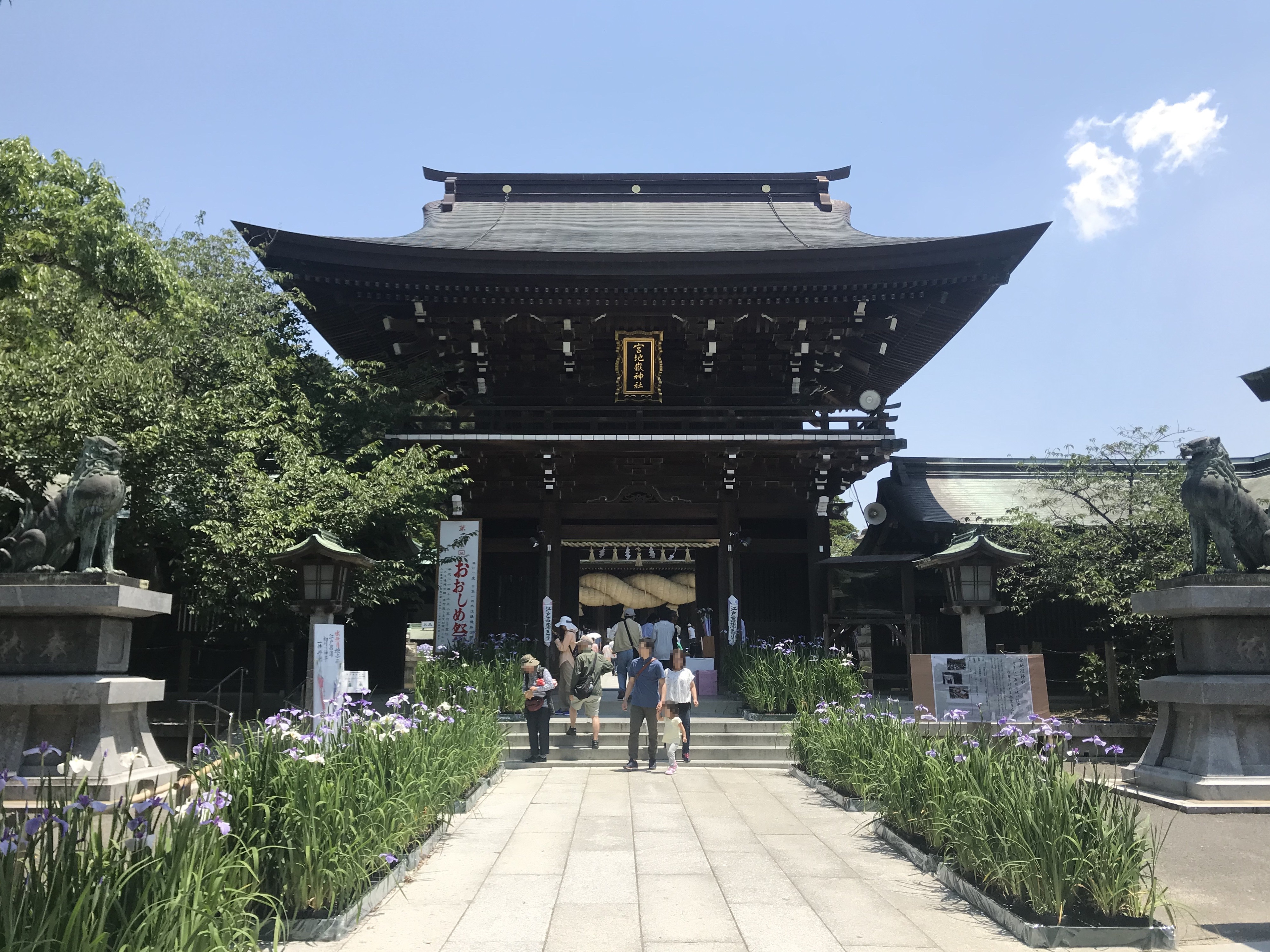 宮地嶽神社の楼門とハナショウブ